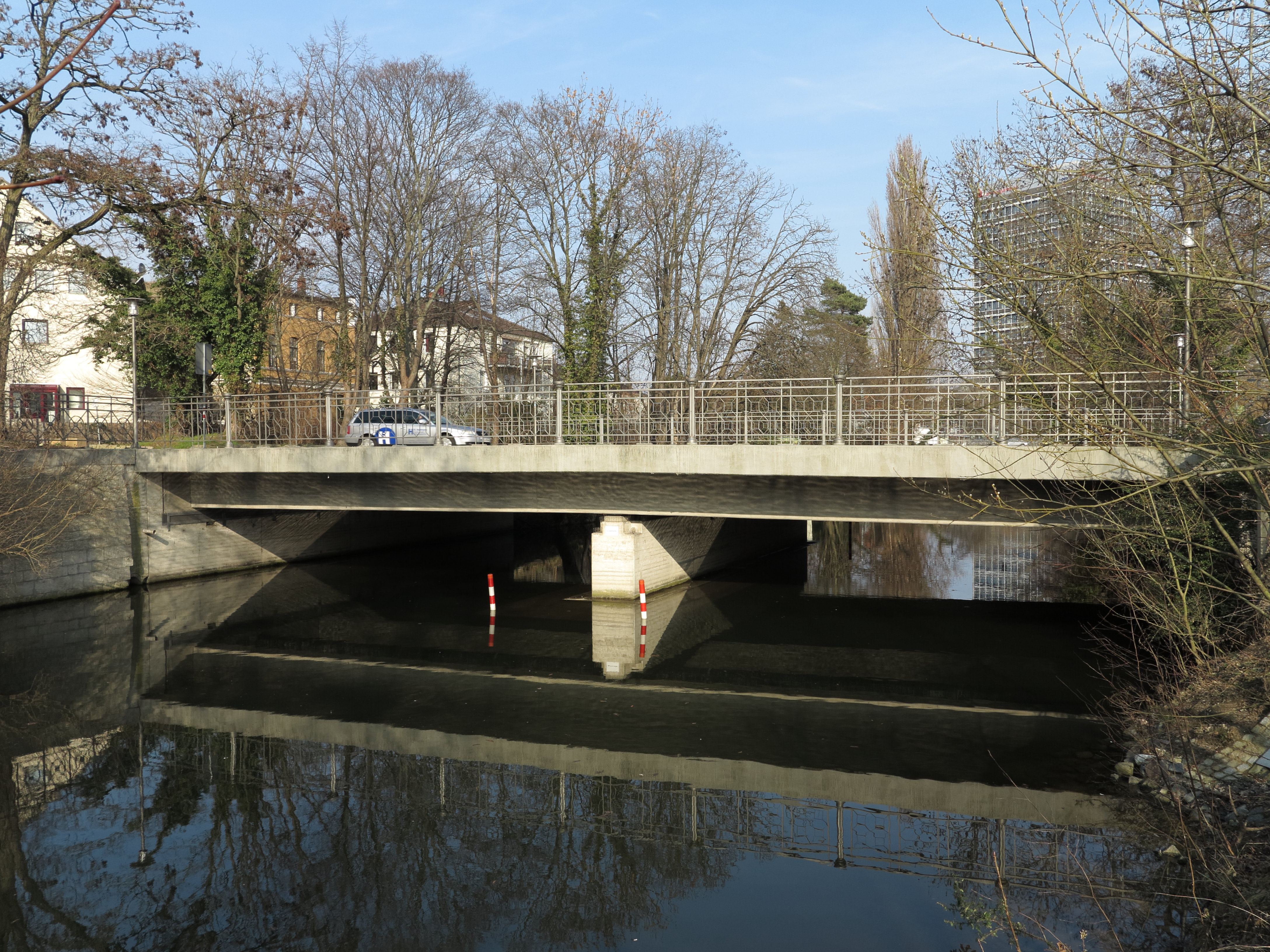 Die Wilhelmitorbrücke in Braunschweig